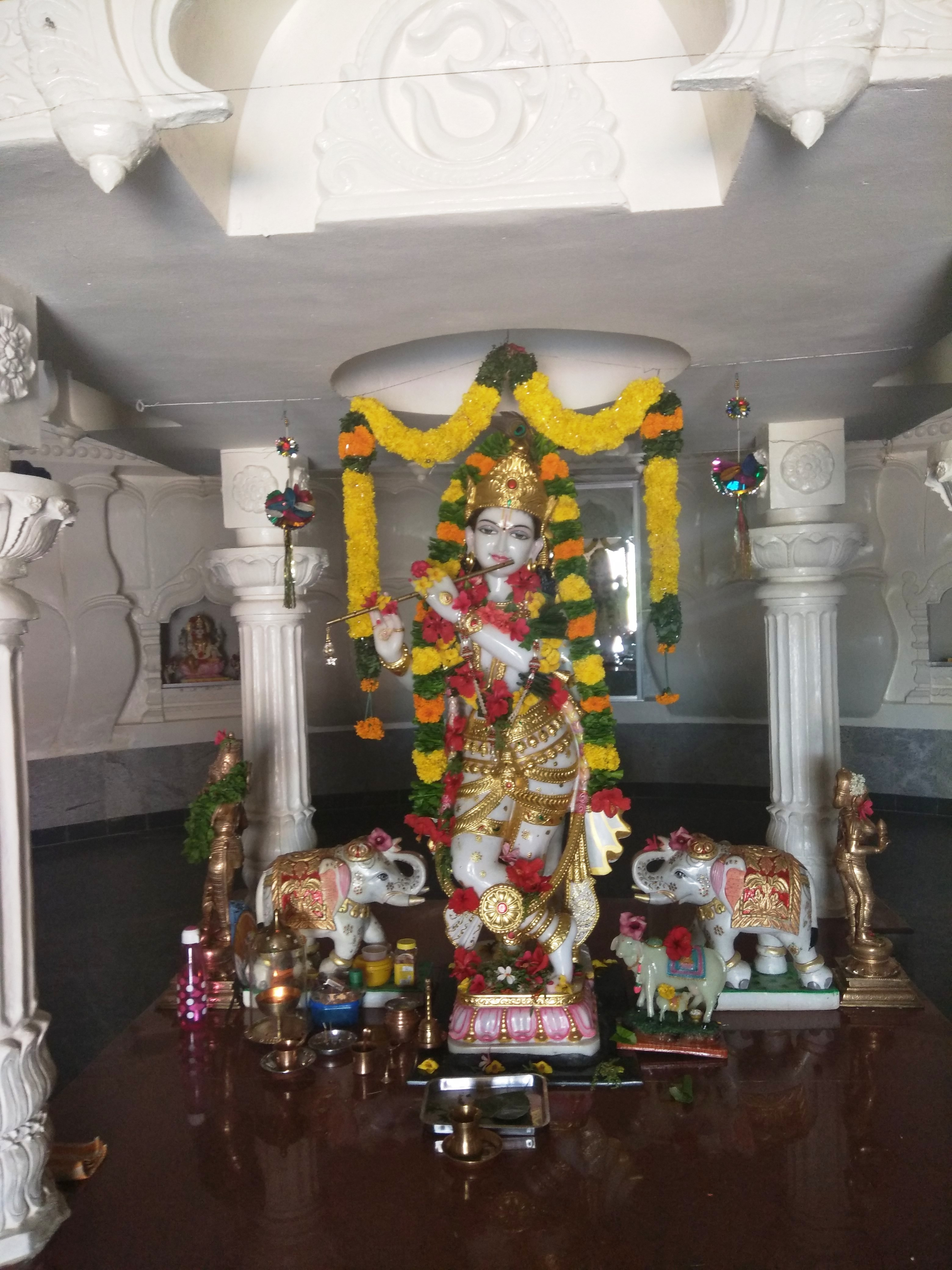 కృష్ణని విగ్రహం